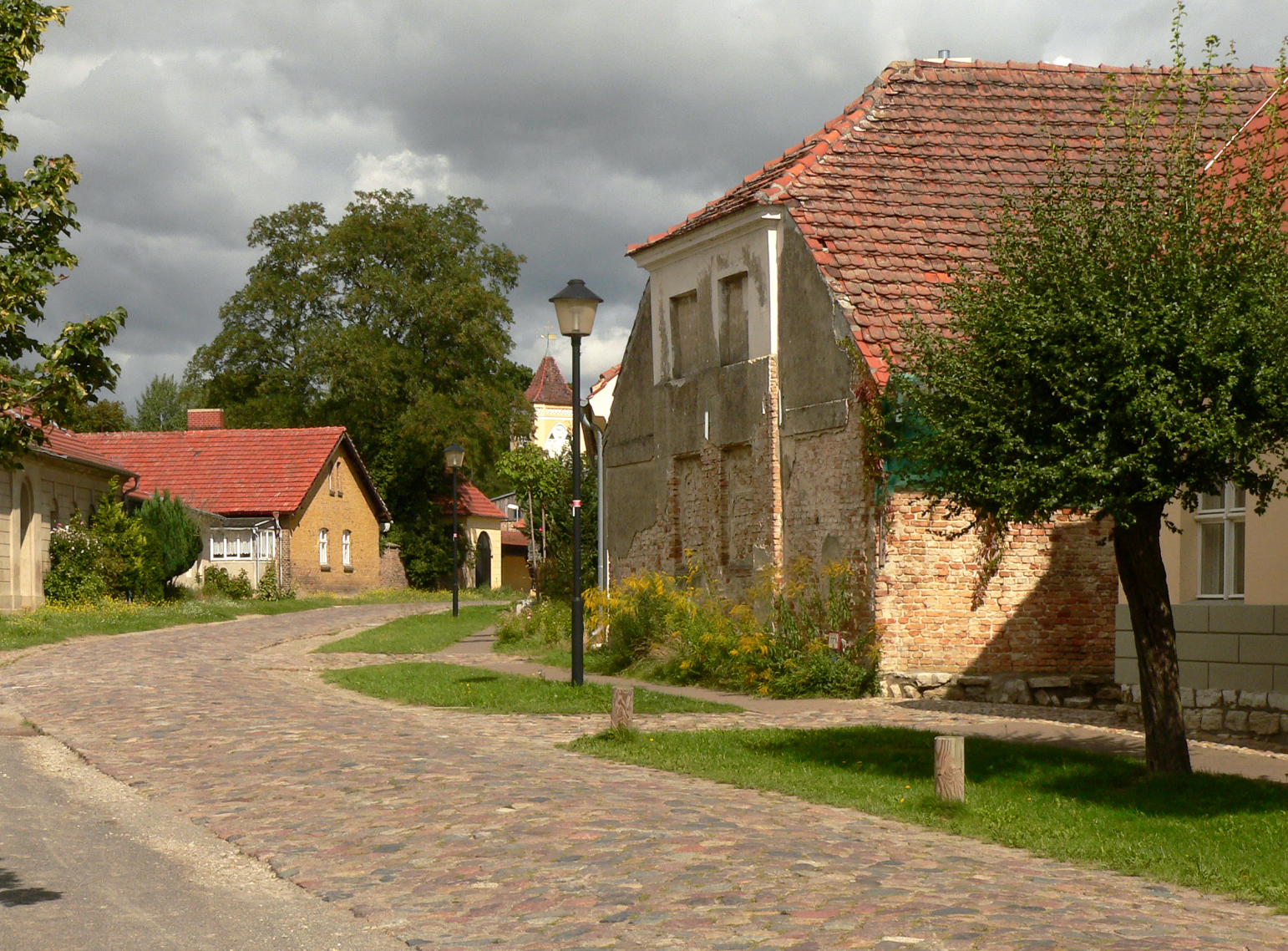 Paretz